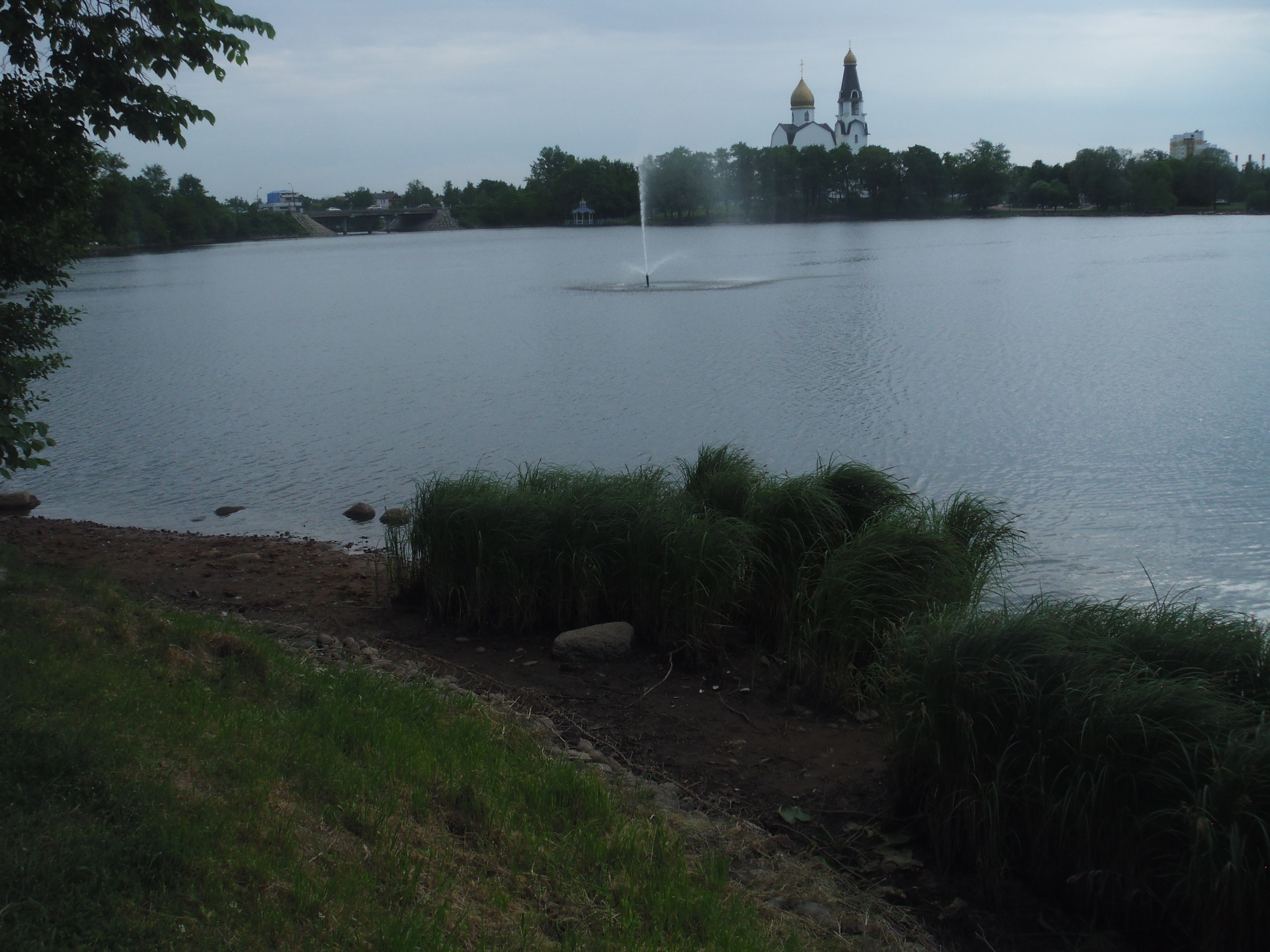 Сестрорецк СПб. Фонтан Беглова